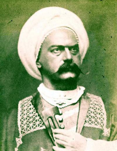 Tommaso Salvini nell'abito di scena dell'Otello.